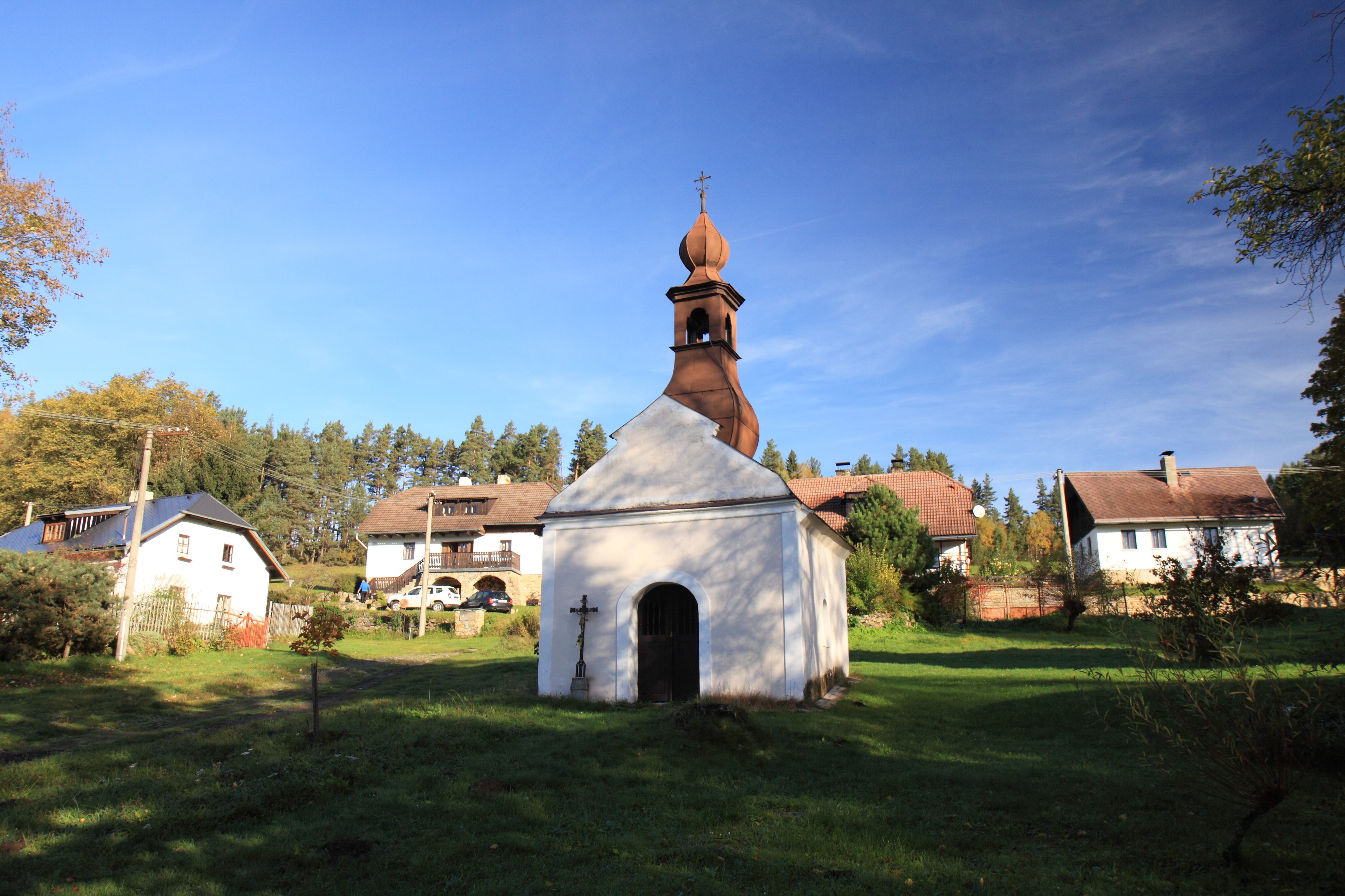 Kaple v Opolenci